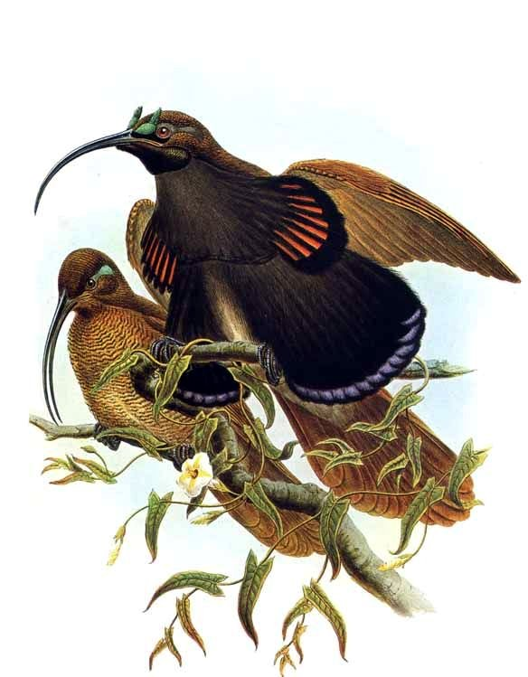 Epimachus albertisi